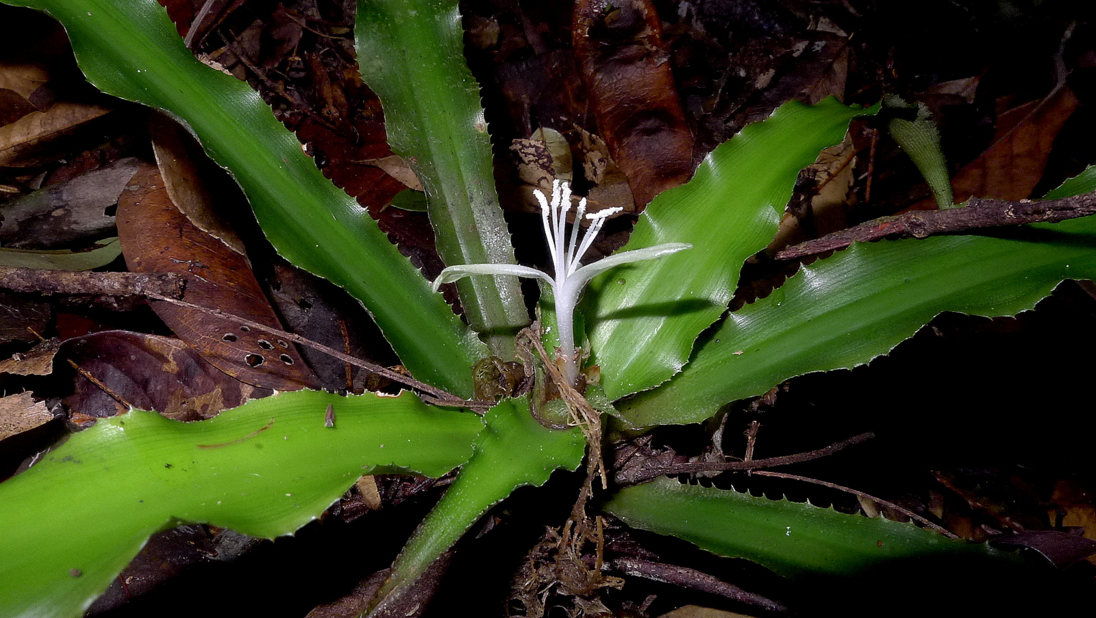 Cryptanthus coriaceus Leme